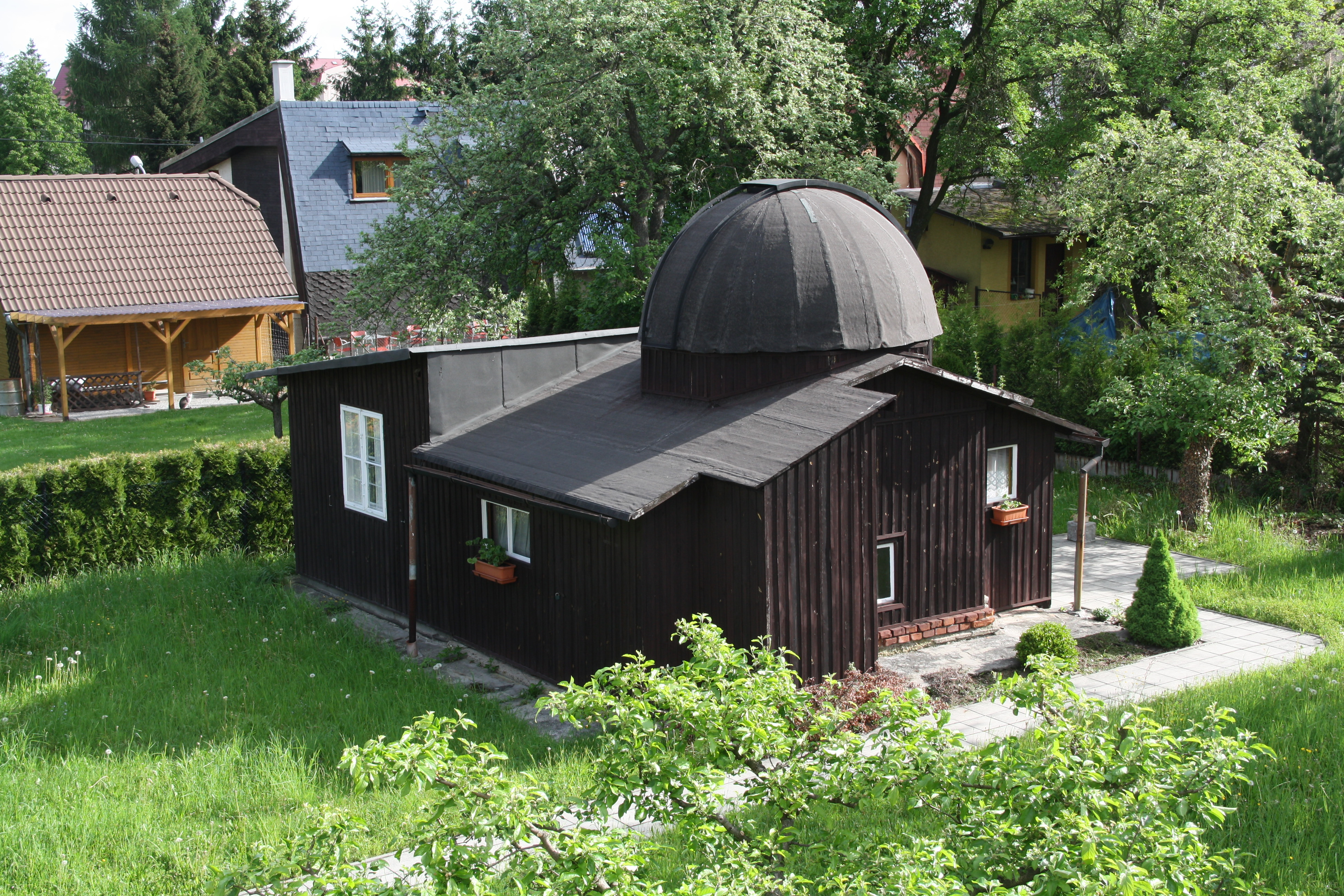 Historická Ballnerova hvězdárna ve Valašském Meziříčí.